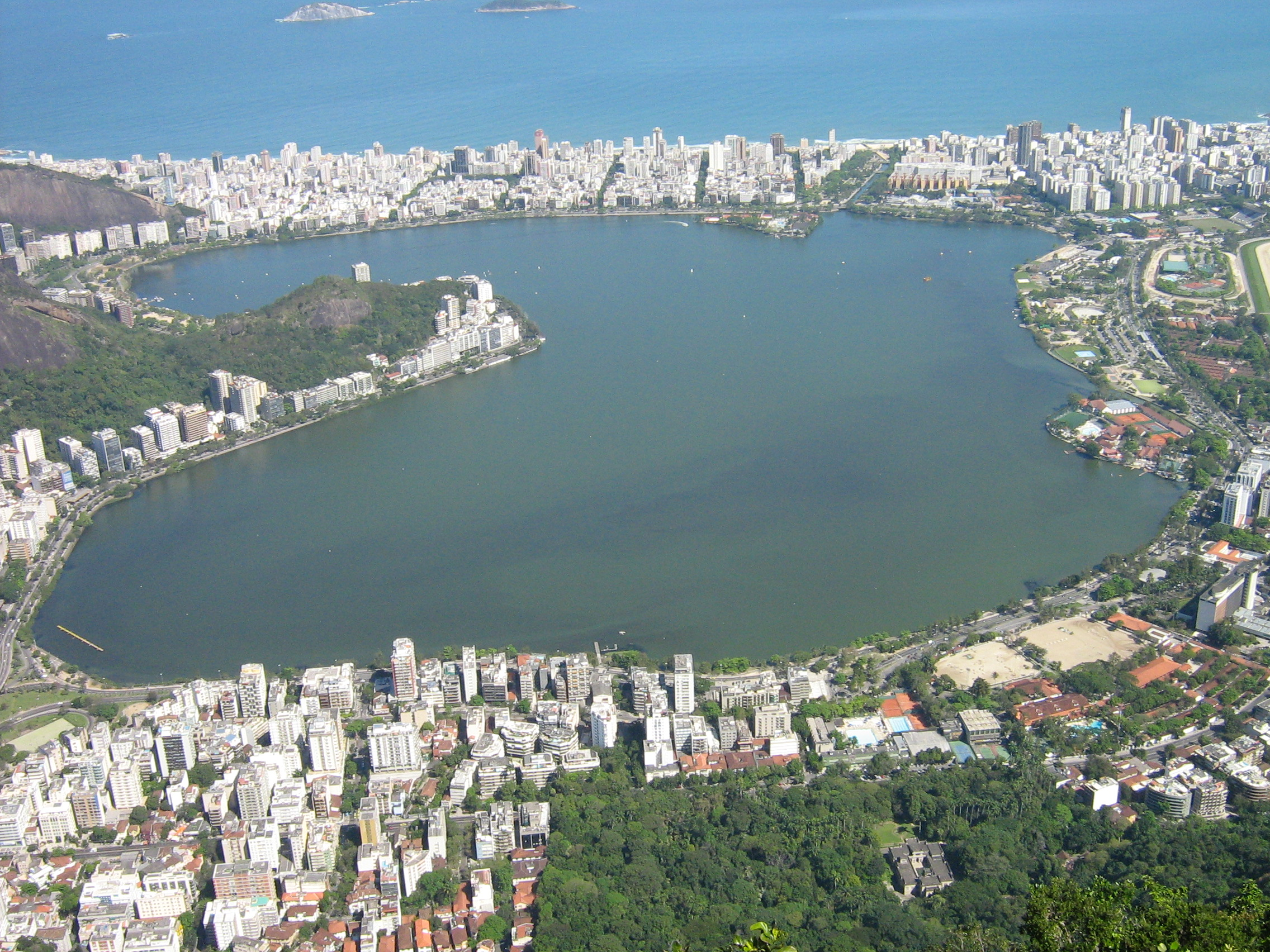 Lagoa Rodrigo de Freitas vista do morro do Corcovado no Rio de Janeiro. Setembro/2006